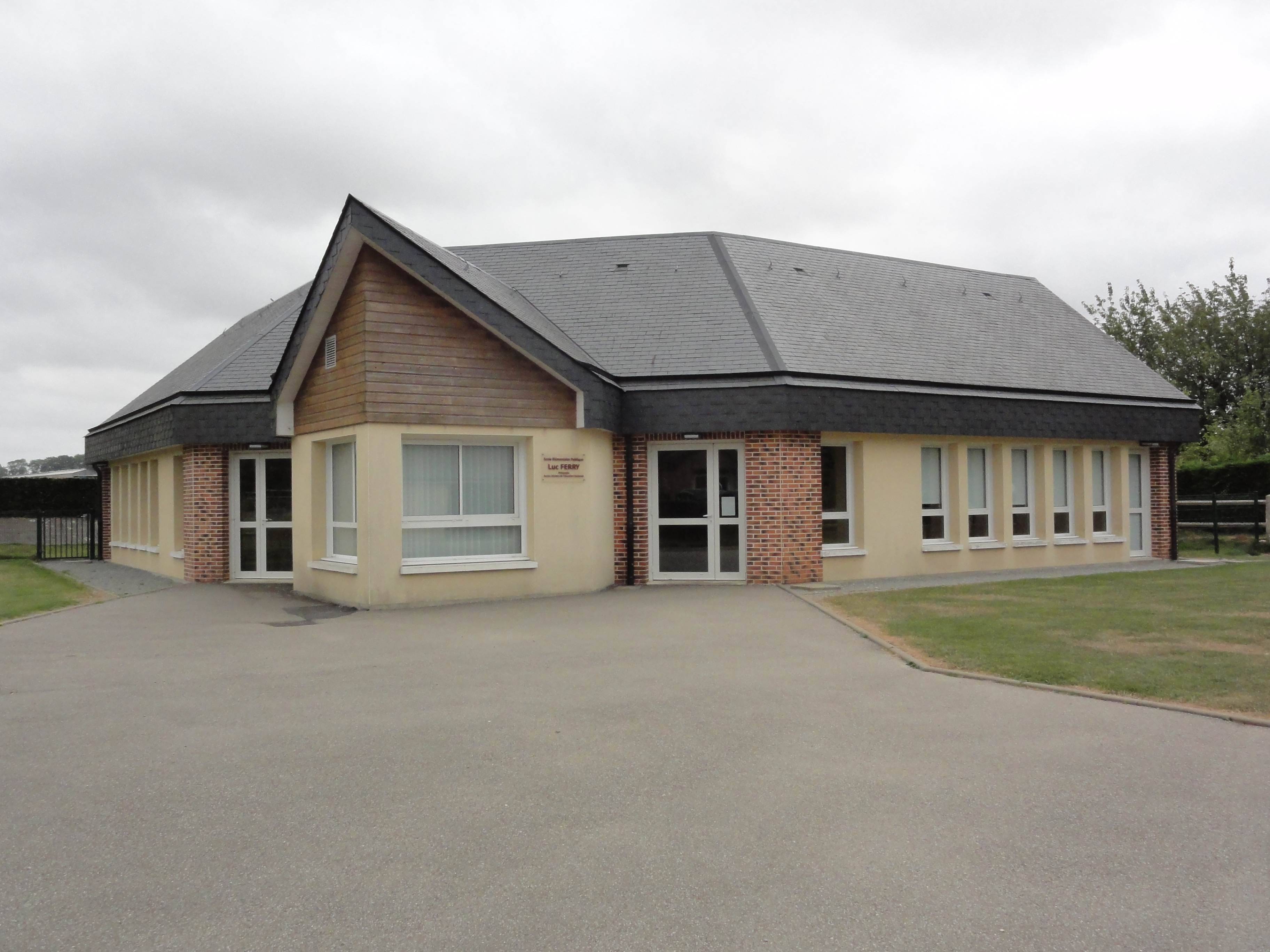 Ricarville (Seine-Mar.) école Luce Ferry